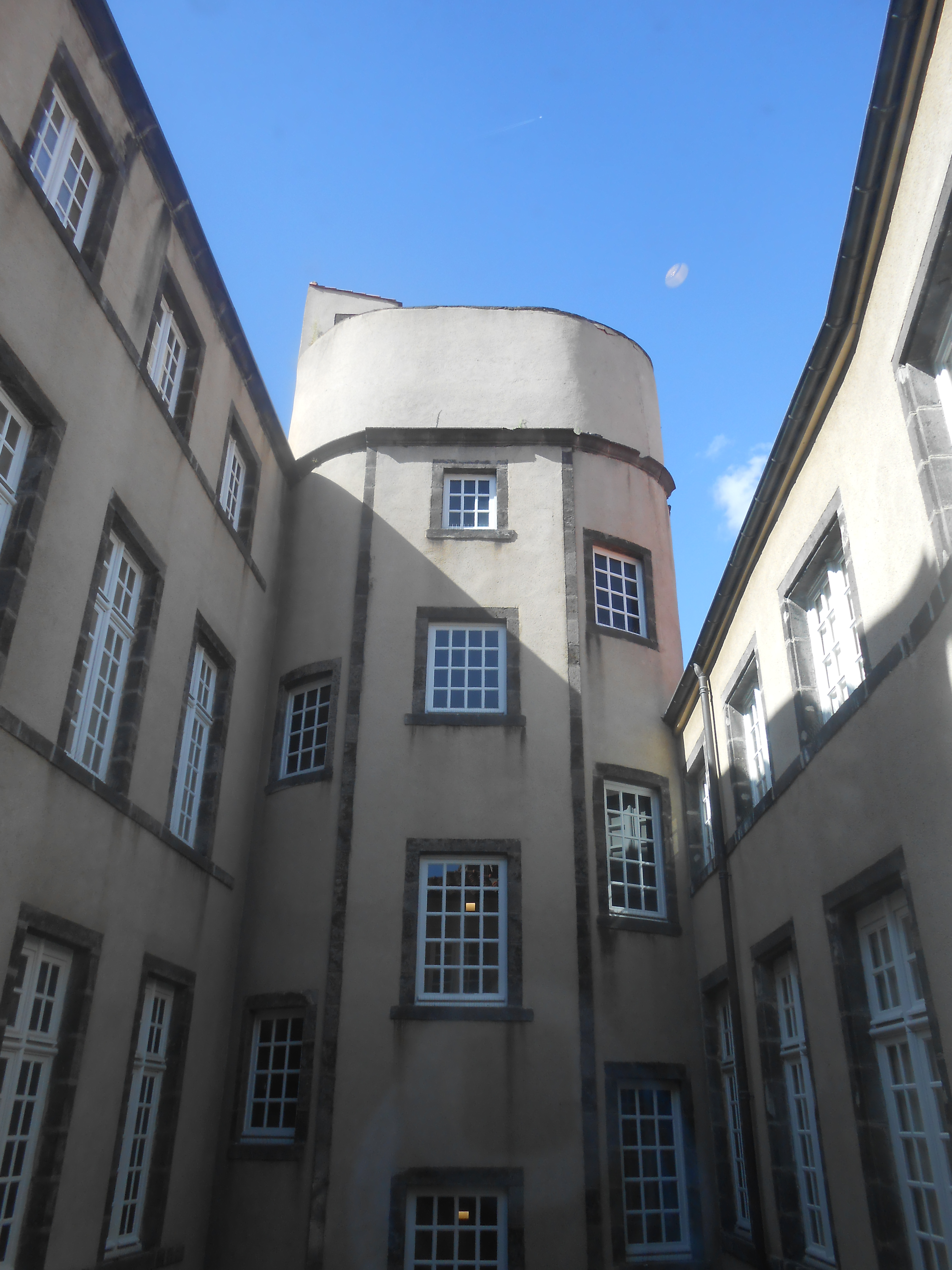 Hôtel Dufraisse, Musée Mandet Riom.